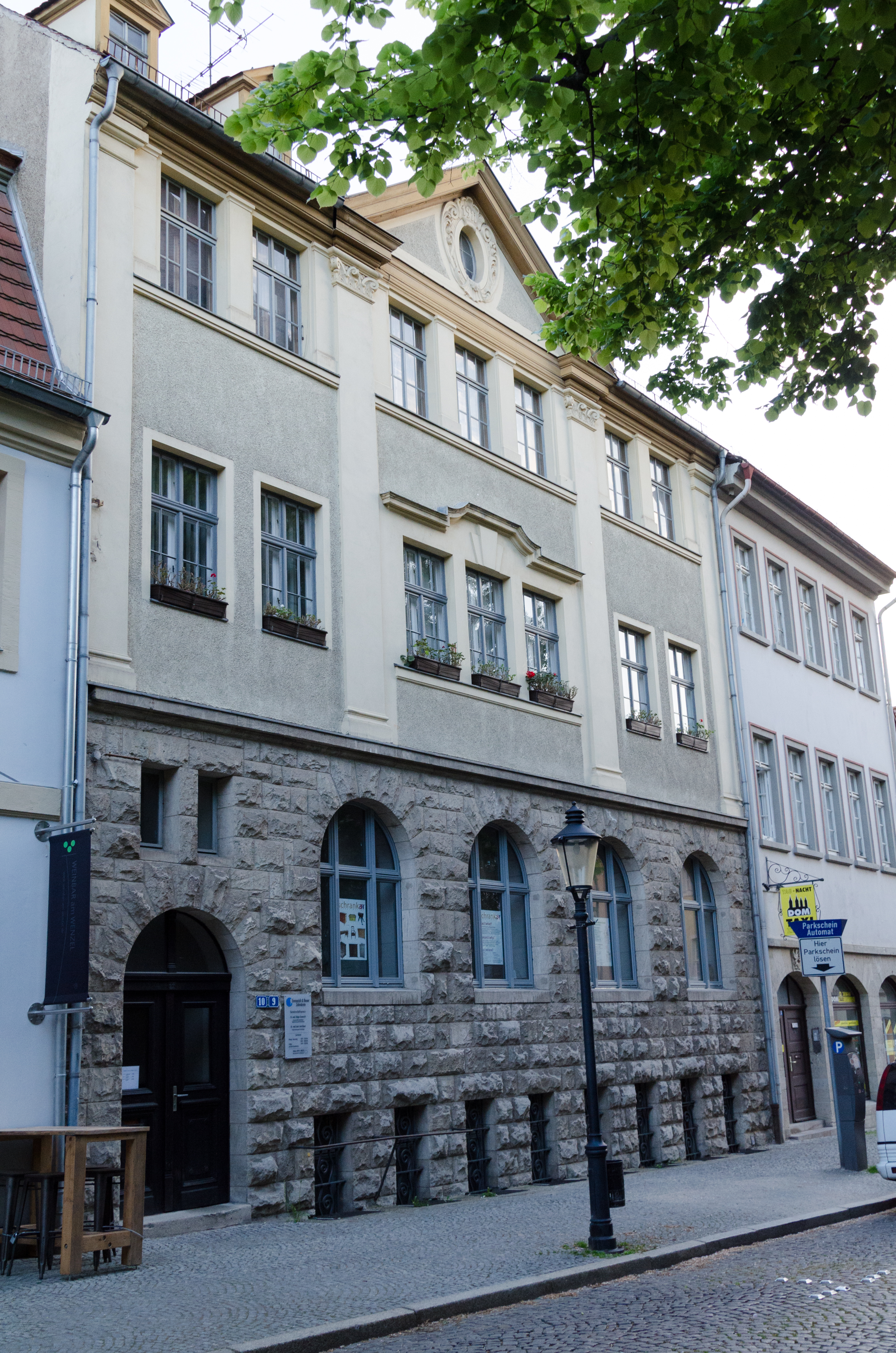 Naumburg, Topfmarkt 9 und 10